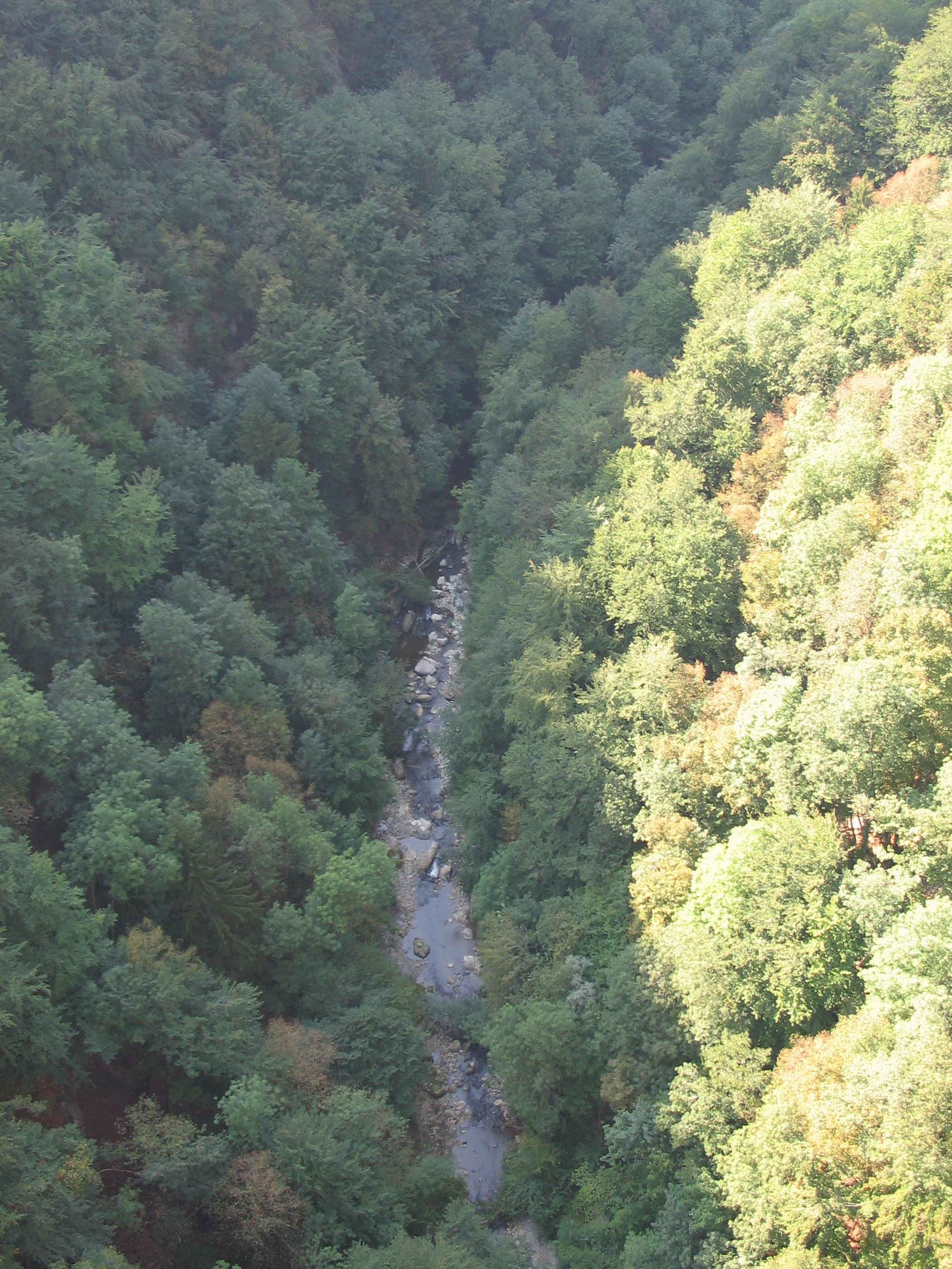 Le ruisseau des Usses, en fond de vallée.